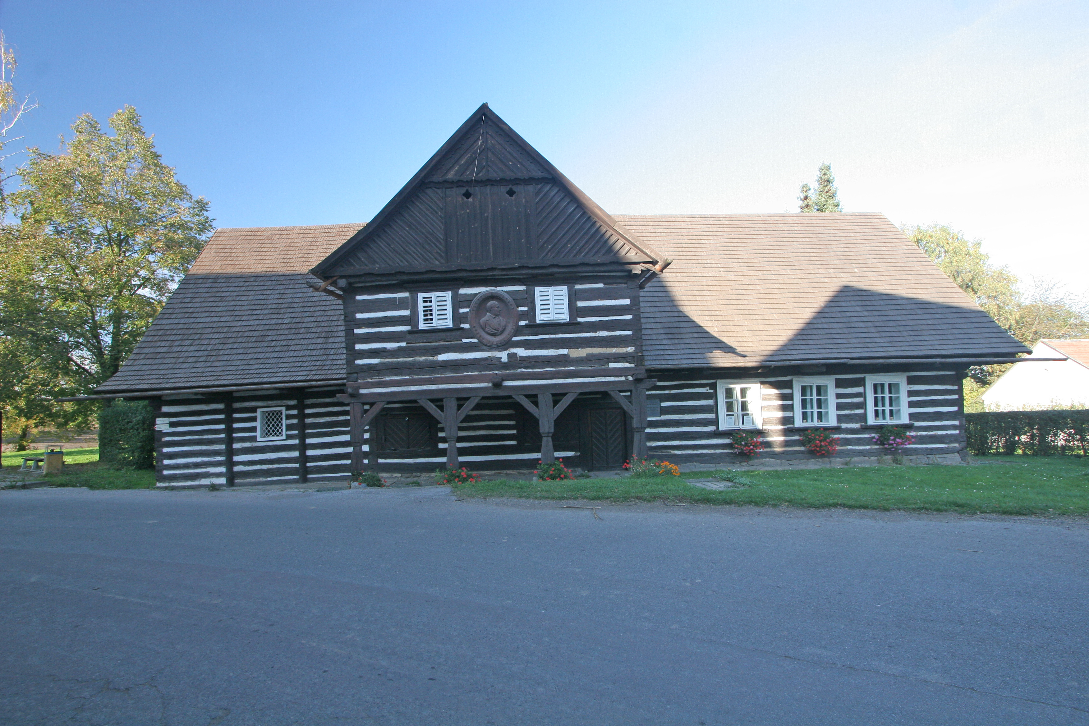 Venkovský dům - rodný dům V. Hanky (Hořiněves), Hořiněves 10